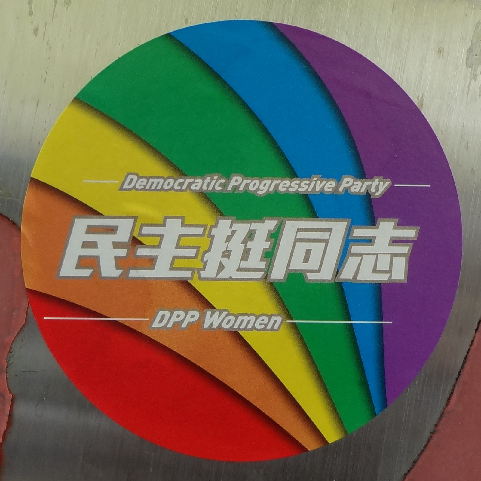 民主進步黨響應2016年10月29日第14屆台灣同志遊行而製作的「民主挺同志」彩虹貼紙。